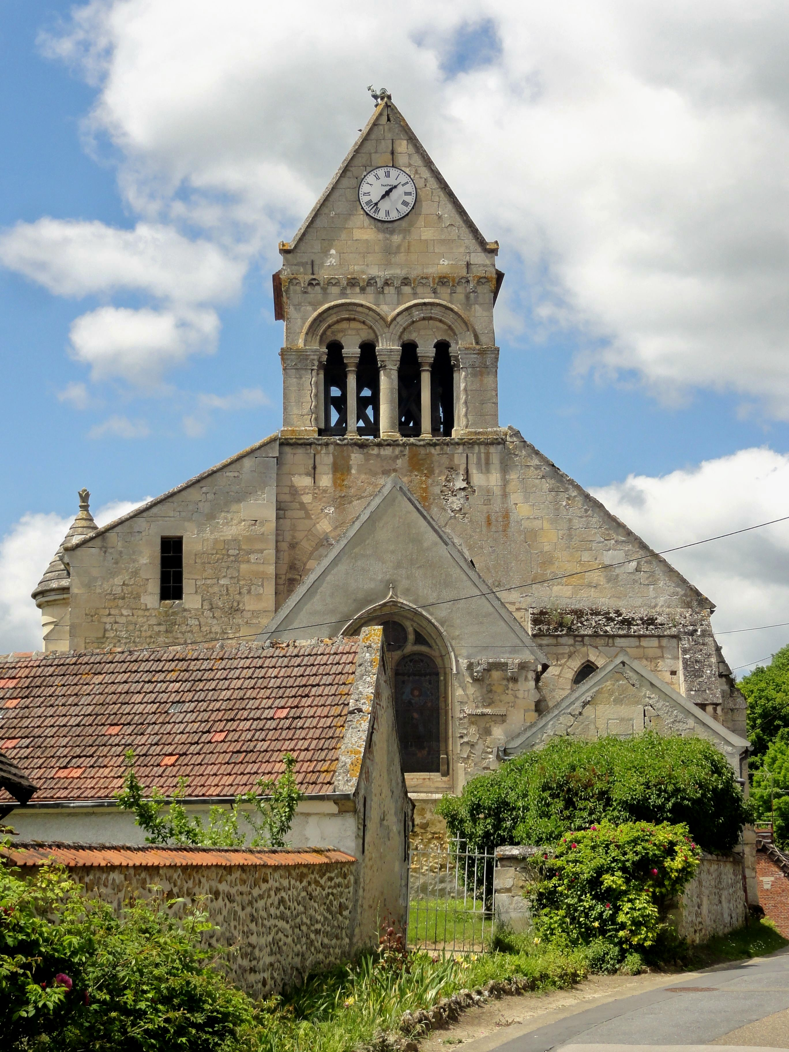 Vue depuis l'est.